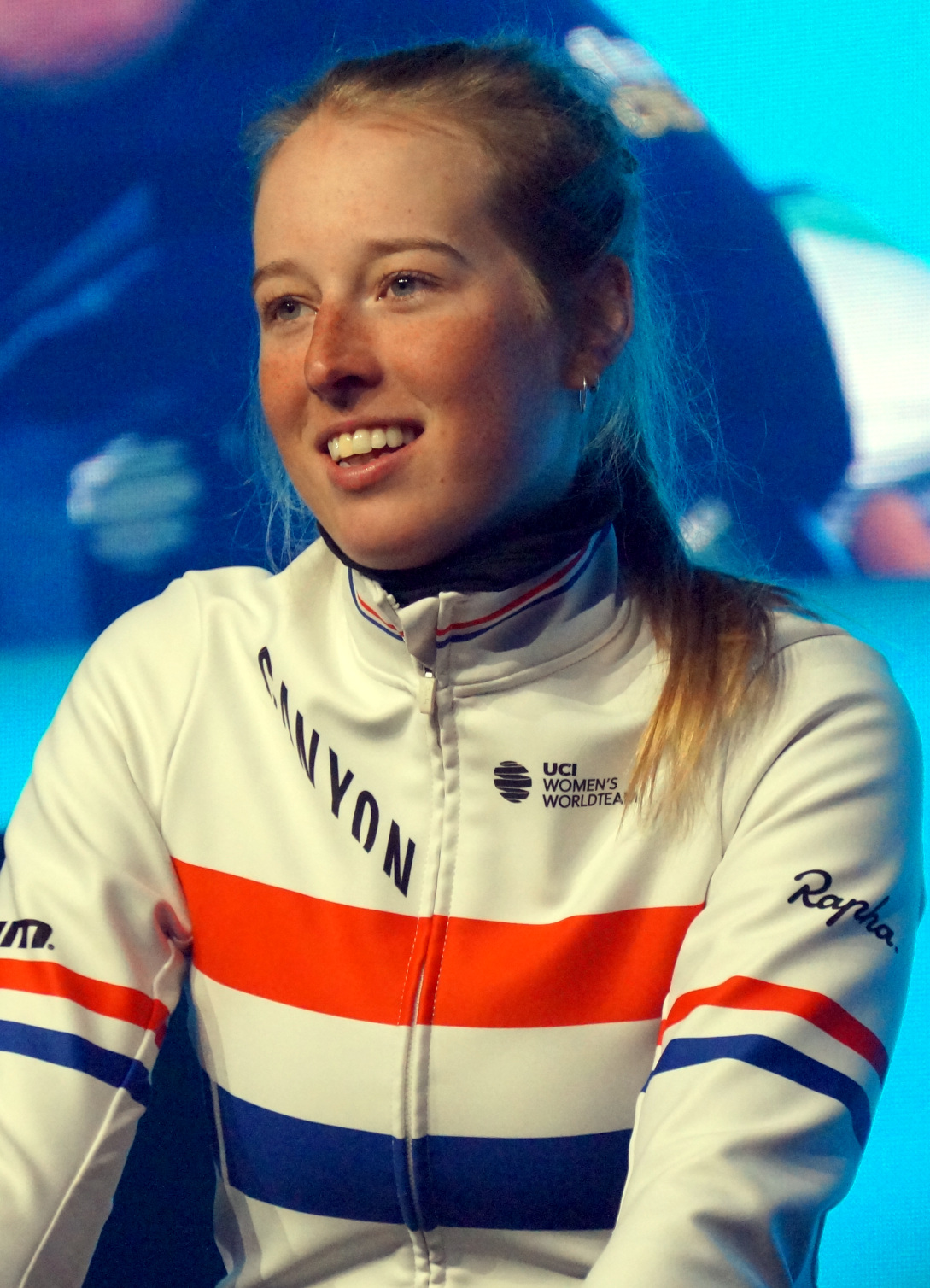 Alice Barnes bij de ploegenvoorstelling in Gent voor de Omloop Het Nieuwsblad 2020